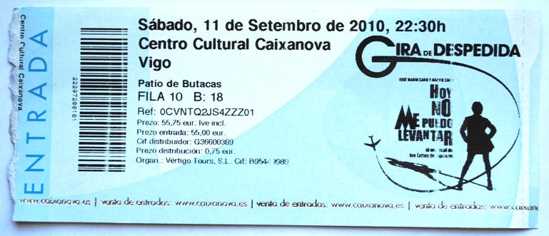 Hoy no me puedo levantar, musical, Vigo